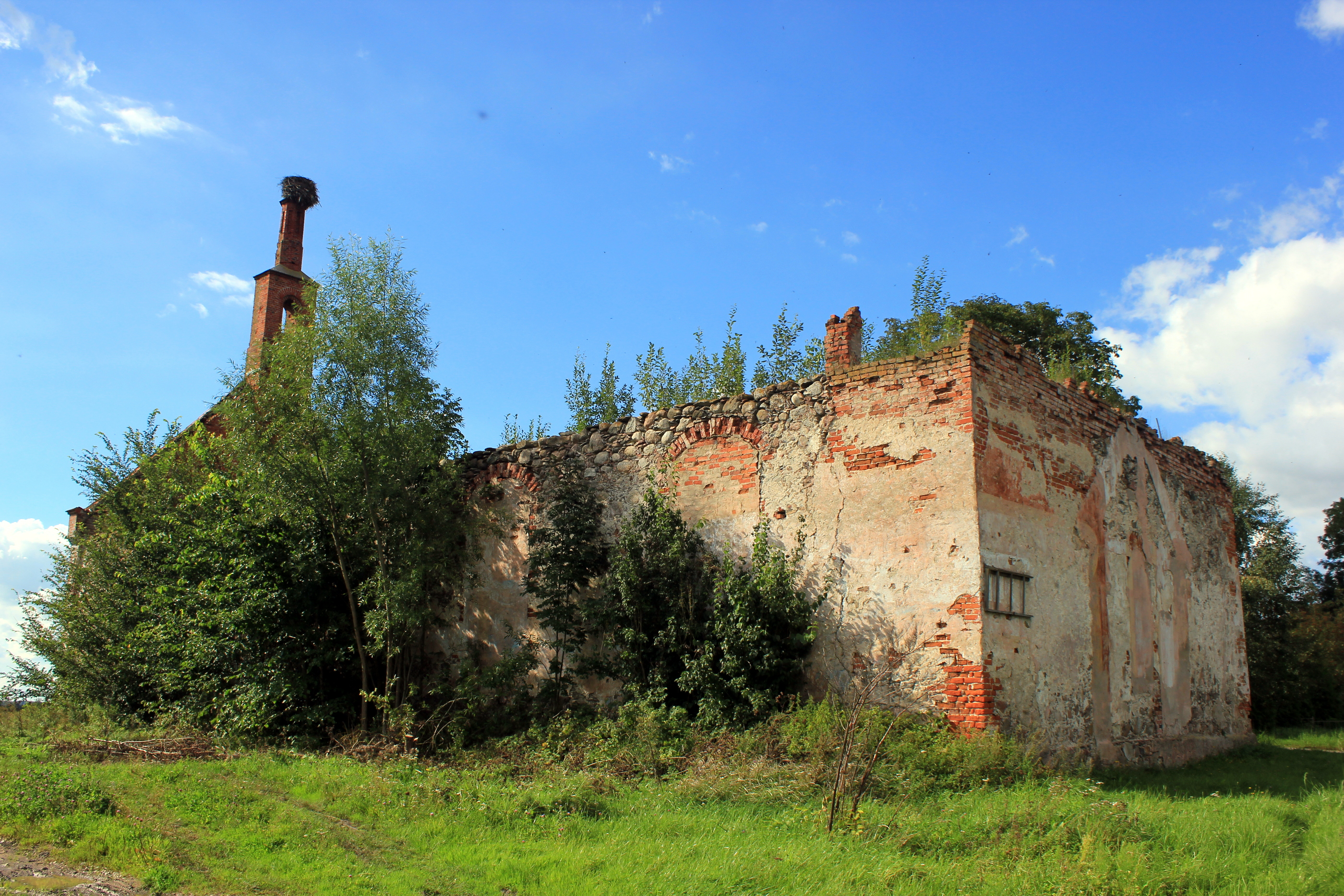 In Malomoschaiskoje (früher deutsch Budwethen), Oblast Kaliningrad, Russland.